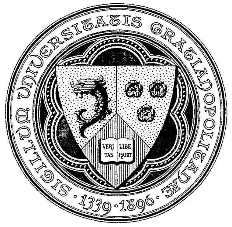 Logo de l'Université de Grenoble en 1896.